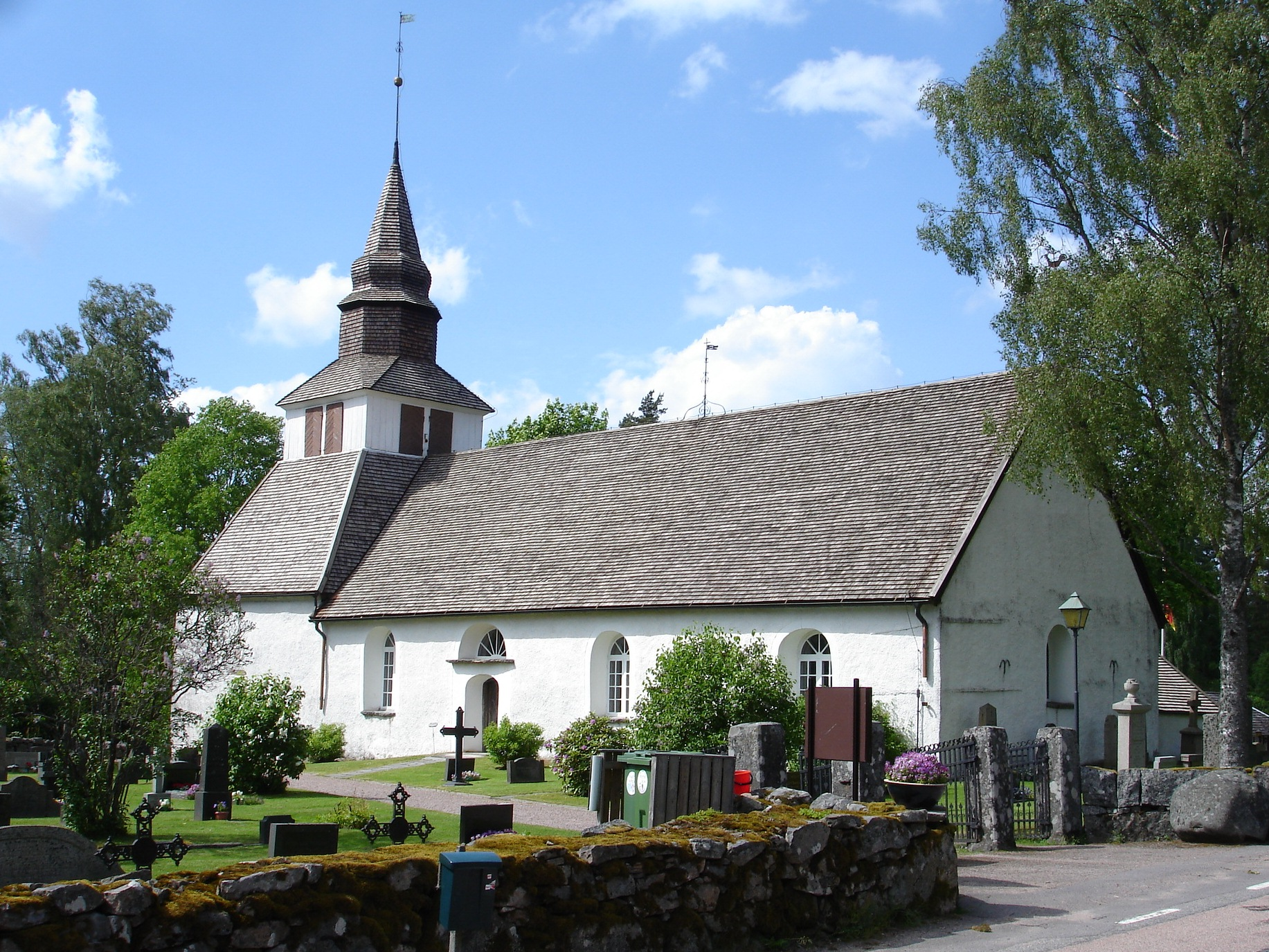 Femsjö kyrka i Hylte kommun